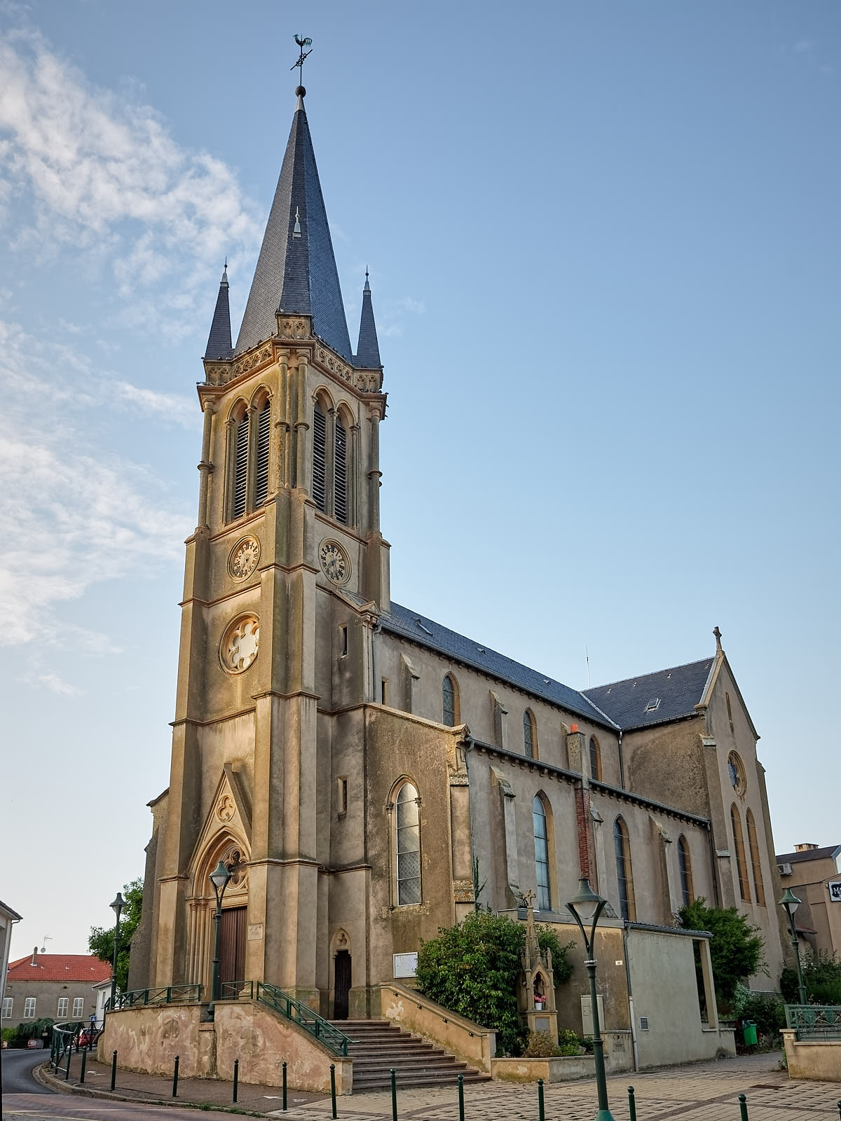 Parvis de l'église avec l'oratoire en bas des marches